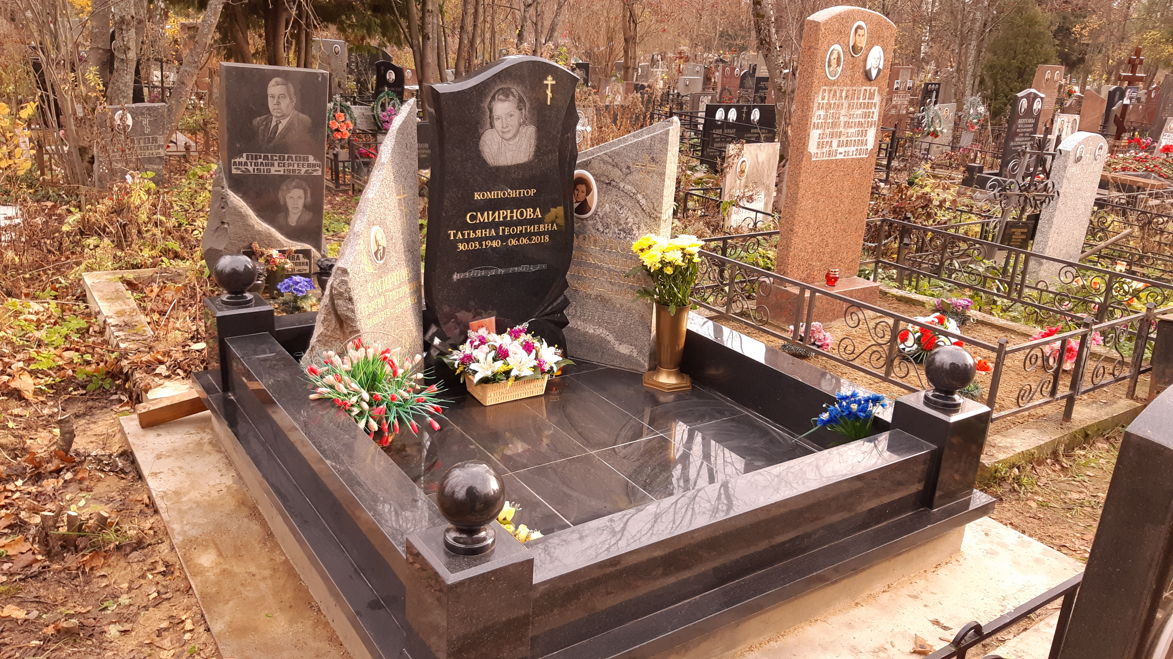 Памятник композитора Татьяны Смирновой и её родителей Митинское кладбище 80 участок